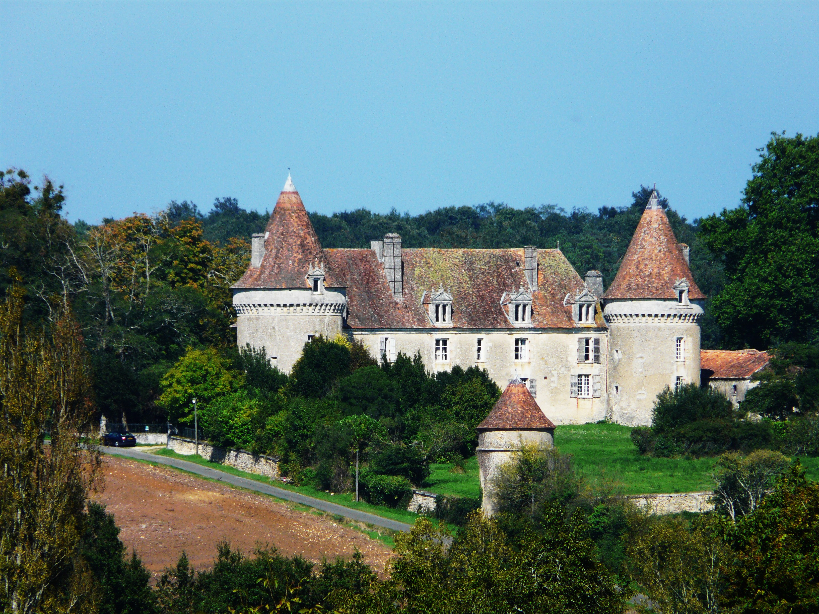 Château de Beauvais, Lussas-et-Nontronneau, Dordogne, France Object location 45° 30′ 41.30″ N, 0° 35′ 23.00″ E - OpenStreetMap - Proximityrama (Info)